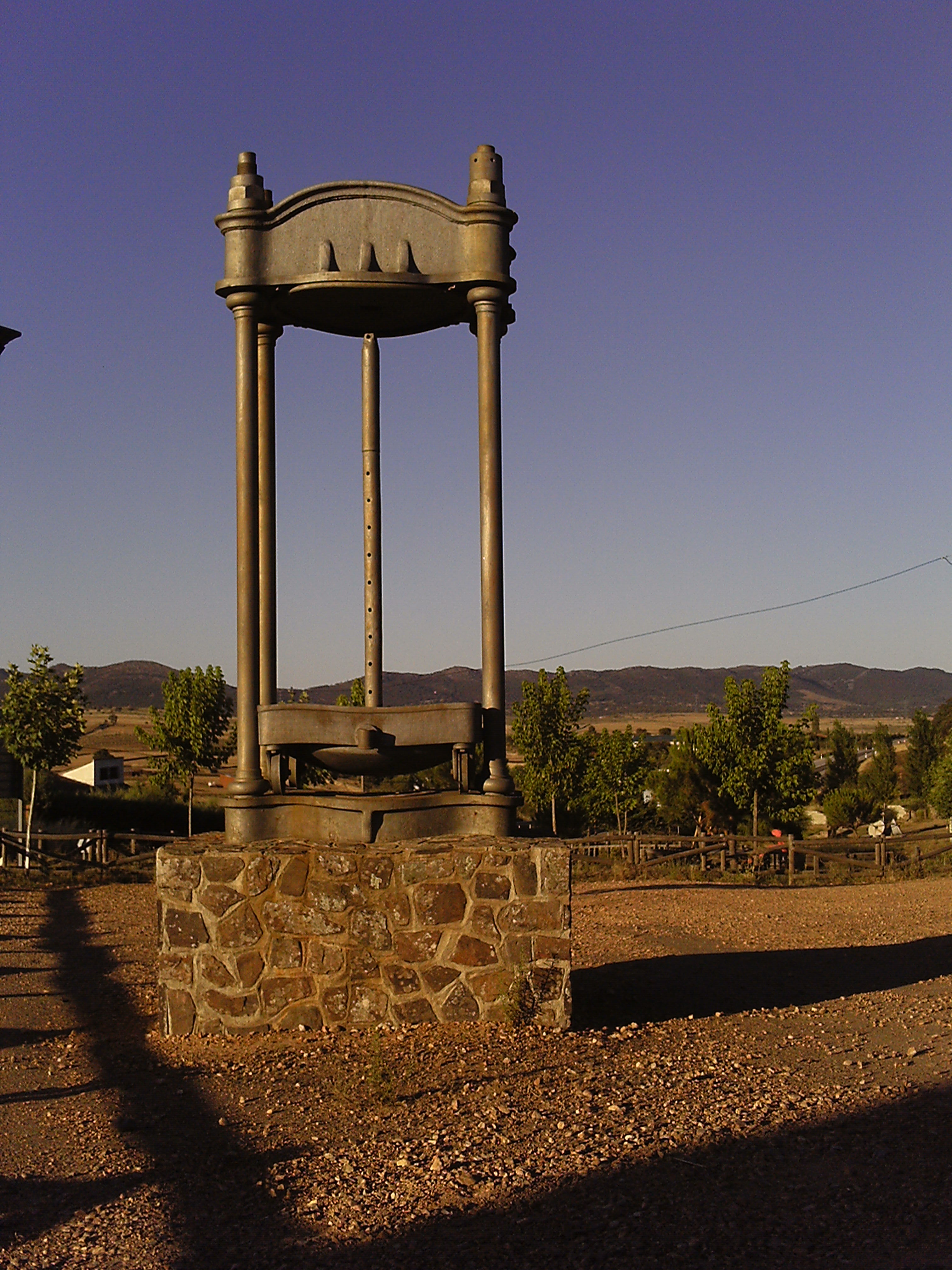 Parque de santo domingo en herrera